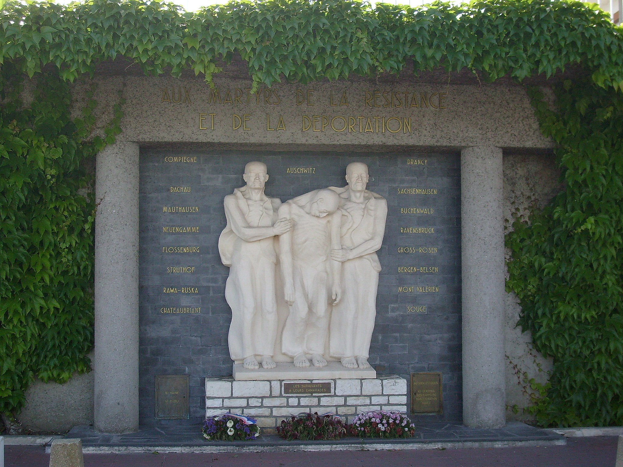 Mémorial des victimes de la shoah